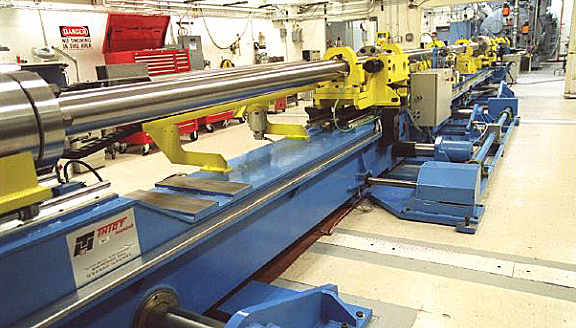 Jasper est un lanceur à gaz double étage appartenant au Lawrence Livermore National Laboratory (USA) réalisé par Thiot Ingénierie. Ce lanceur de laboratoire est connu mondialement pour la qualité et la puissance de ses tirs.